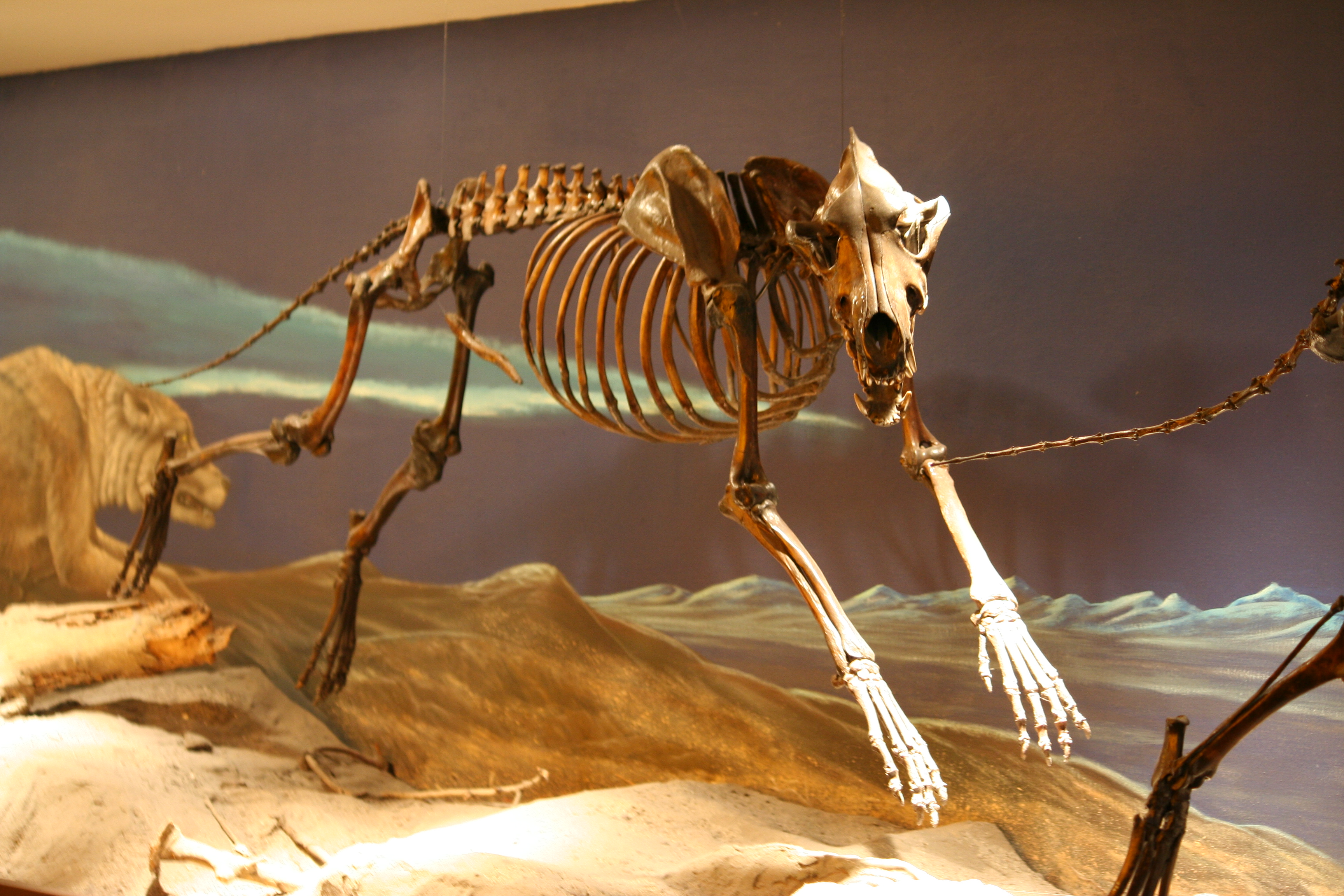 La Brea Tar Pits